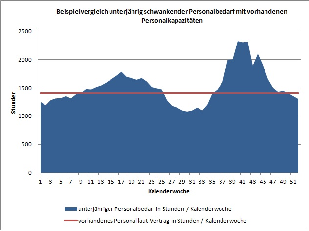 Vergleich zwischen saisonal schwankendem Personalbedarf und tatsächlich vorhandenen Personalkapazitäten